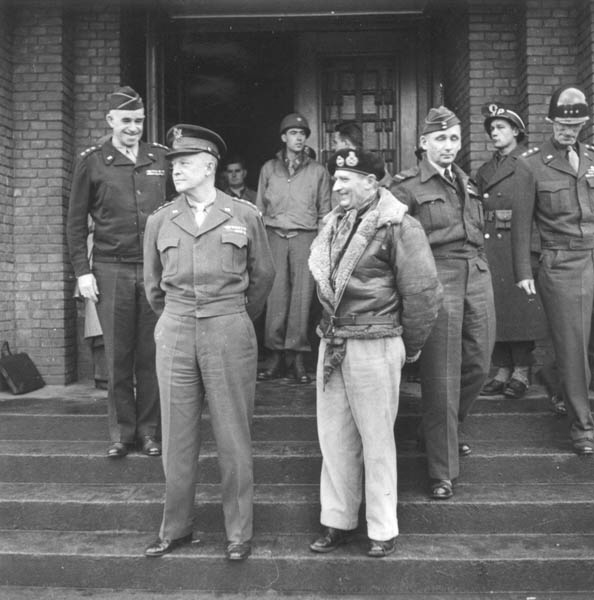 Vijf commandanten van het Westfront op de trappen van het Henric van Veldekecollege in Maastricht (tijdelijk militair hoofdkwartier van het Amerikaanse 9e Leger) na het overleg over het Ardennenoffensief ("Maastricht meeting"), 7 december 1944. Vooraan: Dwight D. Eisenhower (US) en Bernard L. Montgomery (GB). Daarachter: Omar N. Bradley (US), Arthur Tedder (GB) en William Hood Simpson (US). Fotocollectie RHCL Maastricht, GAM 4101.